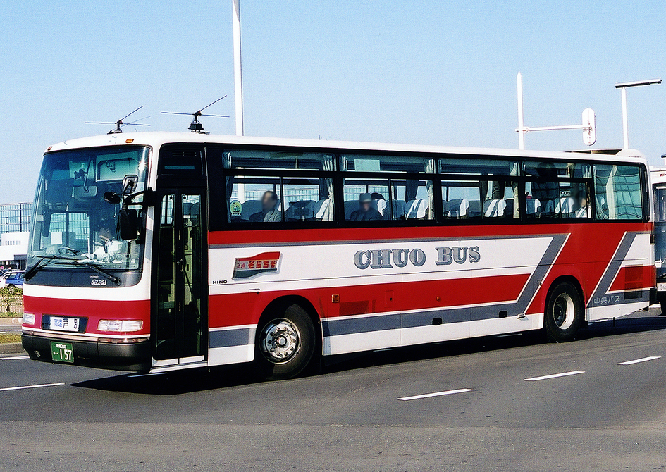 北海道中央バス 高速そらち号 日野・セレガFD U-RU3FSCB